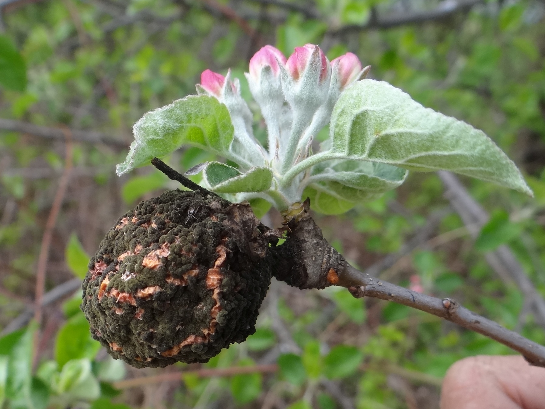 Monilinia fructigena on Malus domestica